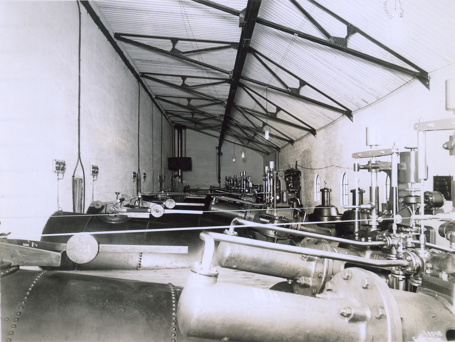 (AS Hafslund / Norsk Hydro). Interiør. Maskiner. Elektrisitetsdirektoratet. Dato: xx.xx.xxxx